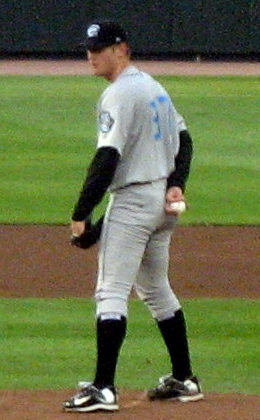 Stephen Strasburg